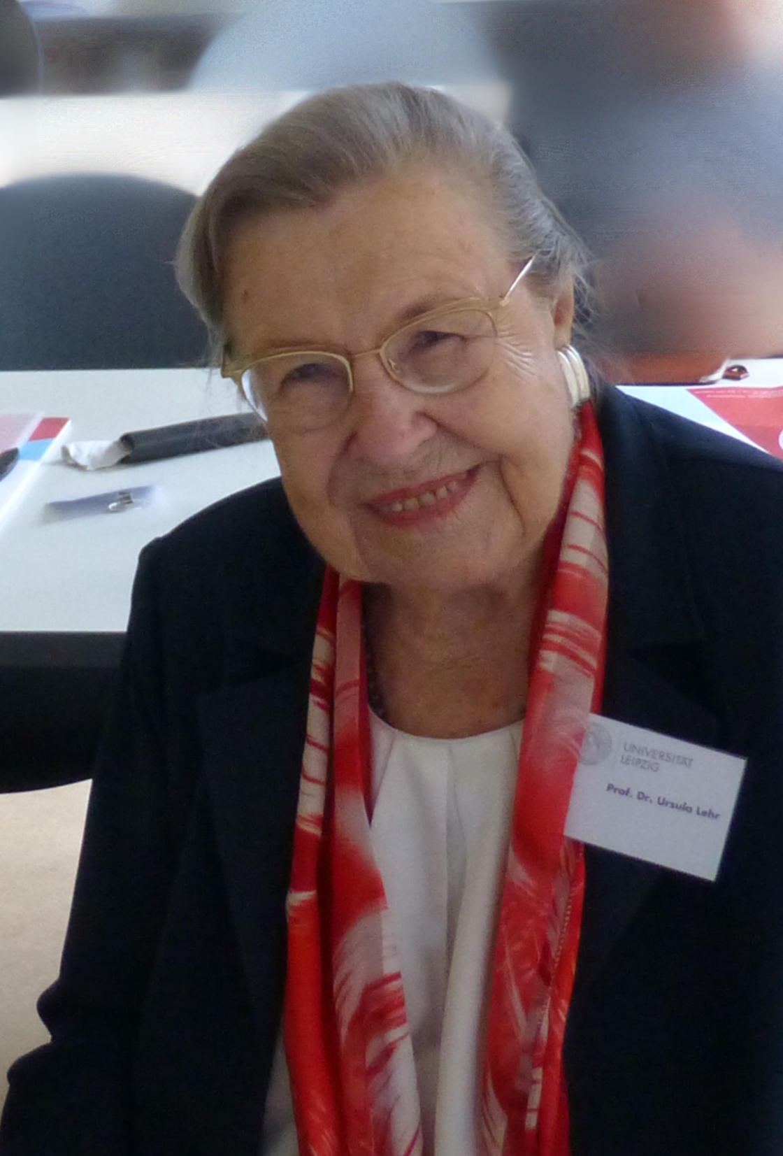 Ursula Lehr nach ihrem Vortrag Lebenslanges Lernen an der Universität Leipzig anlässlich 40 Jahre Seniorenkolleg 2019